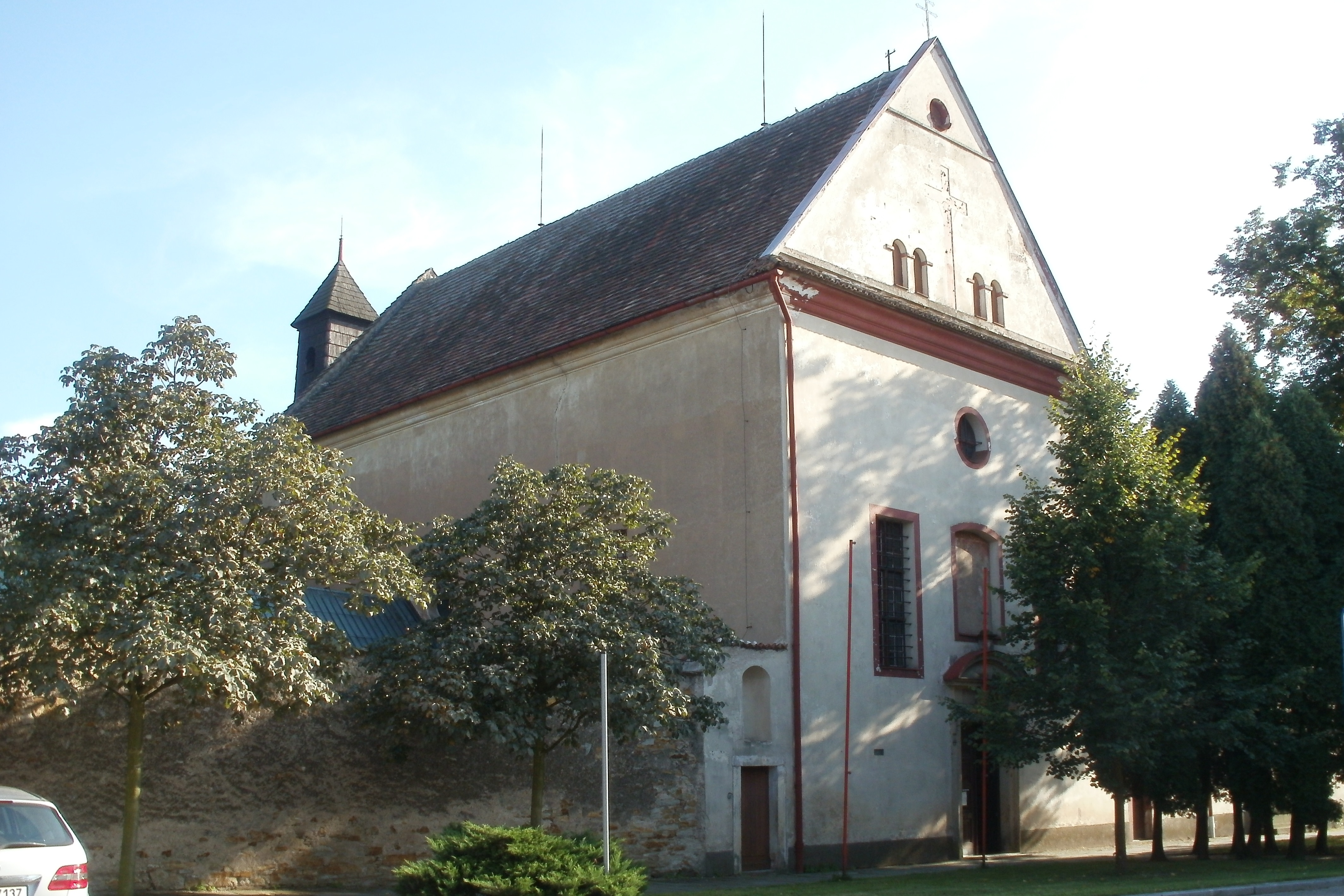 Klášter kapucínský s kostelem Narození Páně (Opočno), Kupkovo nám. 132, Opočno